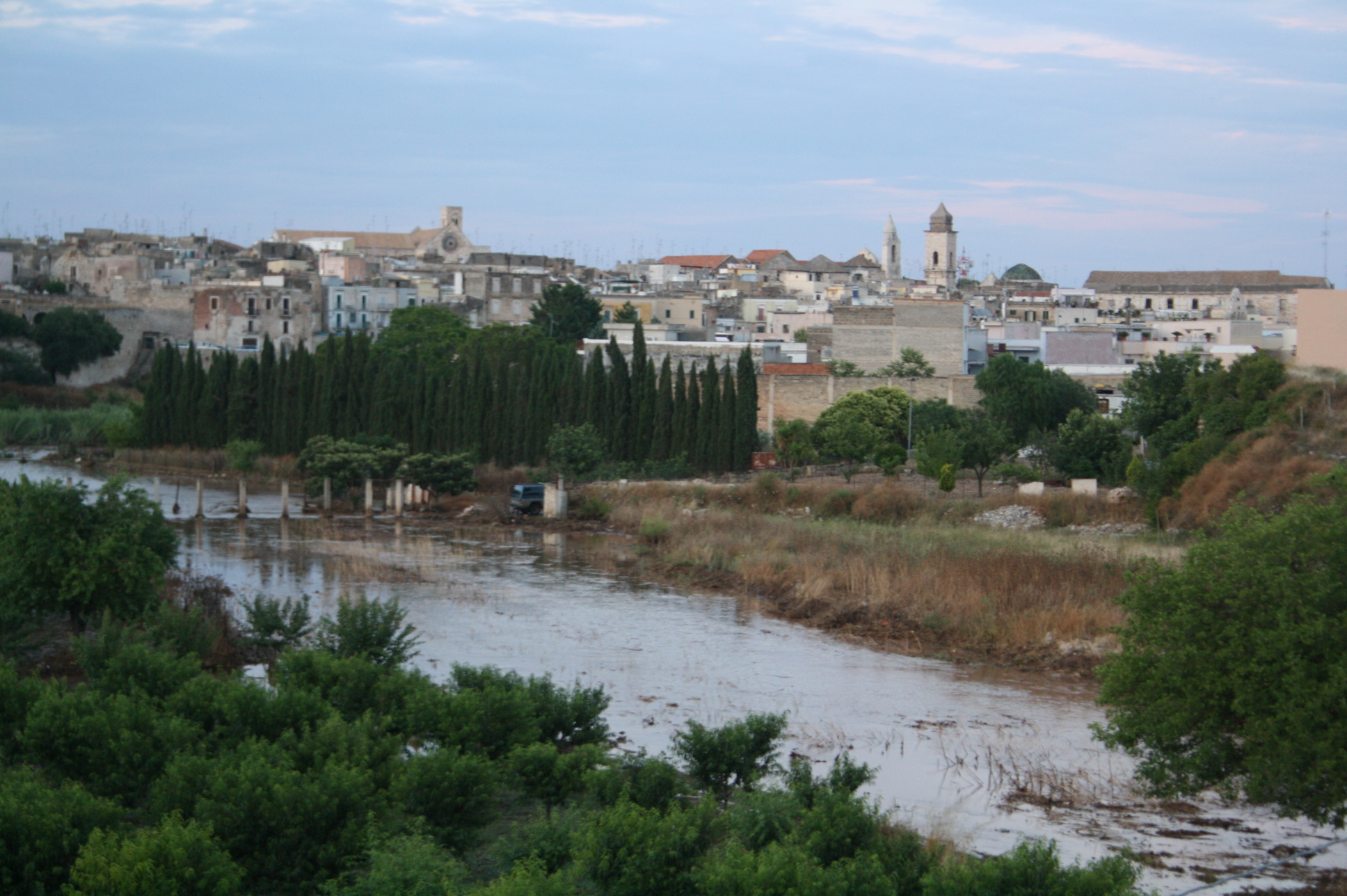 parco naturale Lama Balice Bitonto This is a photo of a monument which is part of cultural heritage of Italy.